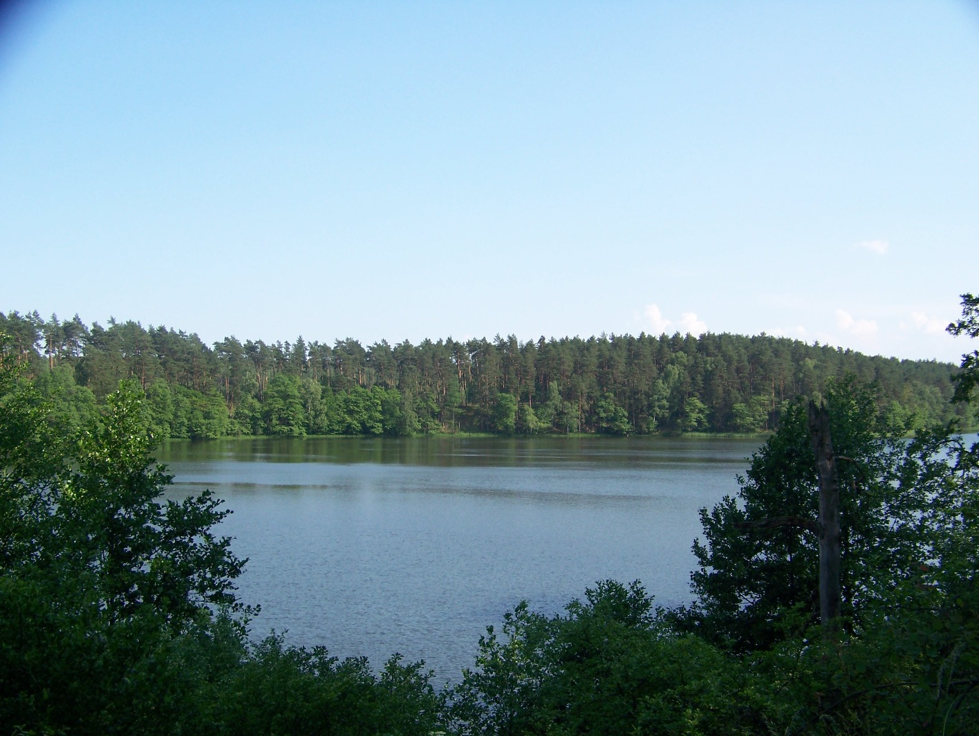 Widok z Kanału Sicieńskiego na północno-wschodni brzeg jeziora Ostrowieckiego, na Kłocie Ostrowieckie, Drawieński Park Narodowy